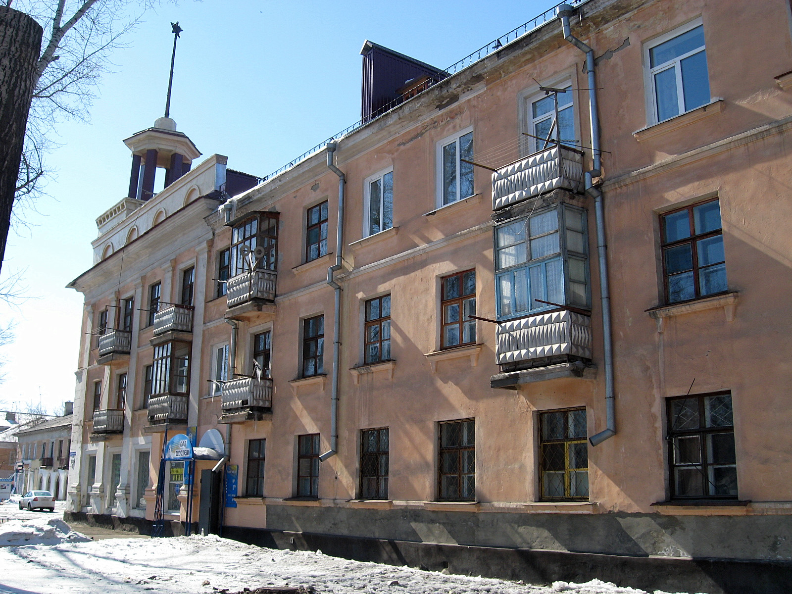 Рубцовск Дом под шпилем